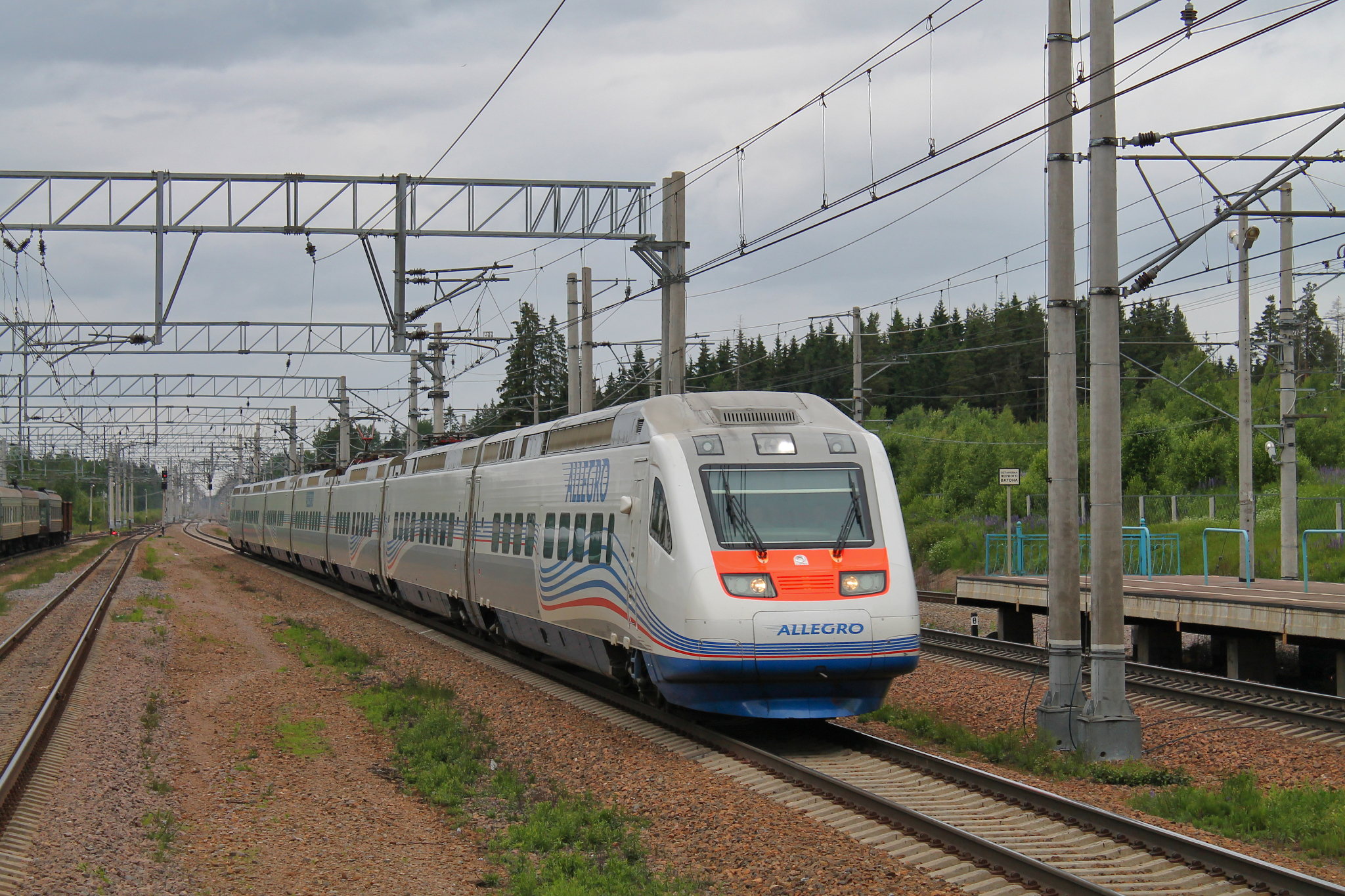 Sm6 «Allegro», станция Каннельярви. см. фото 511294 в альбоме автора